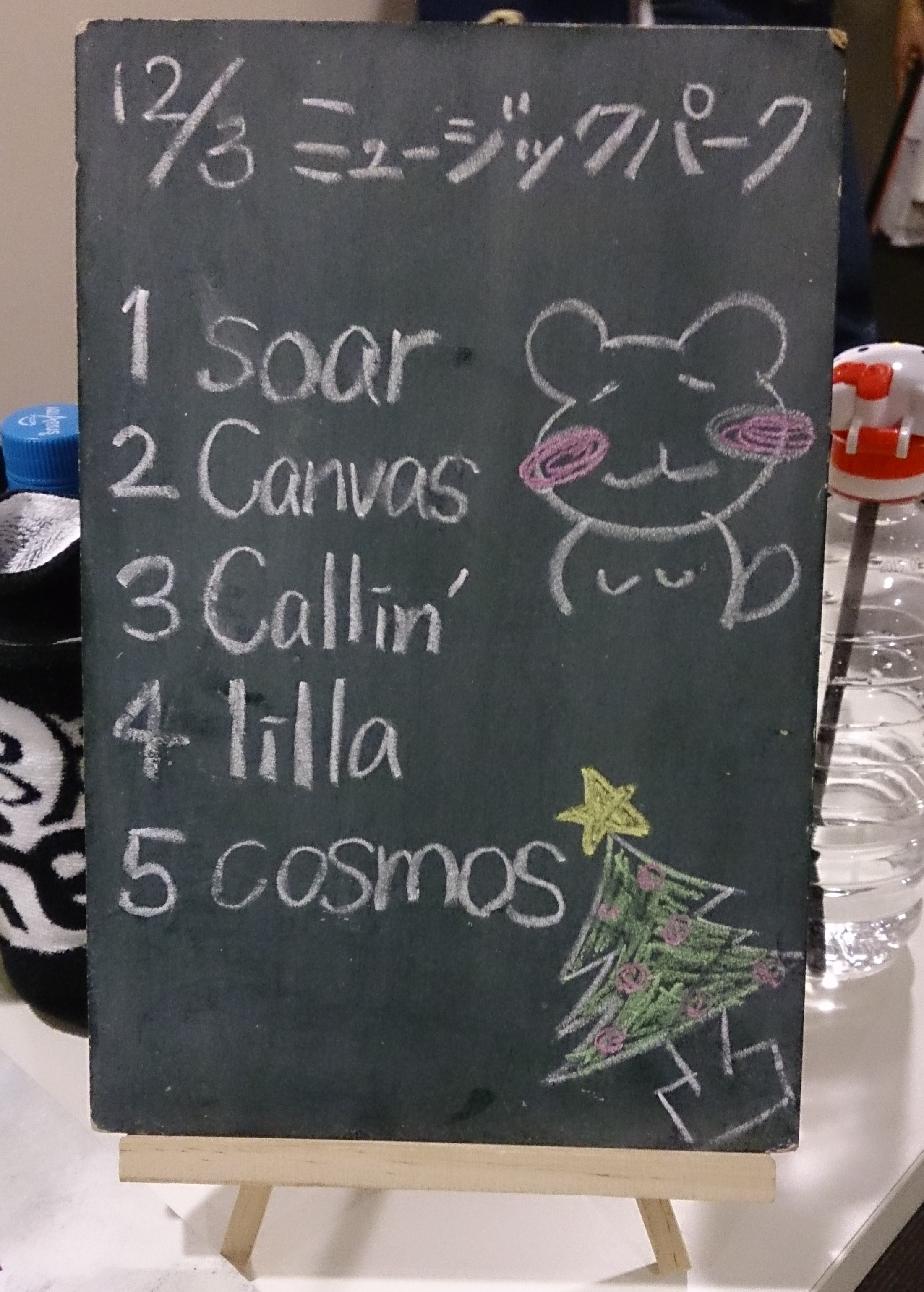 amiinAセトリボード(20171203(1))